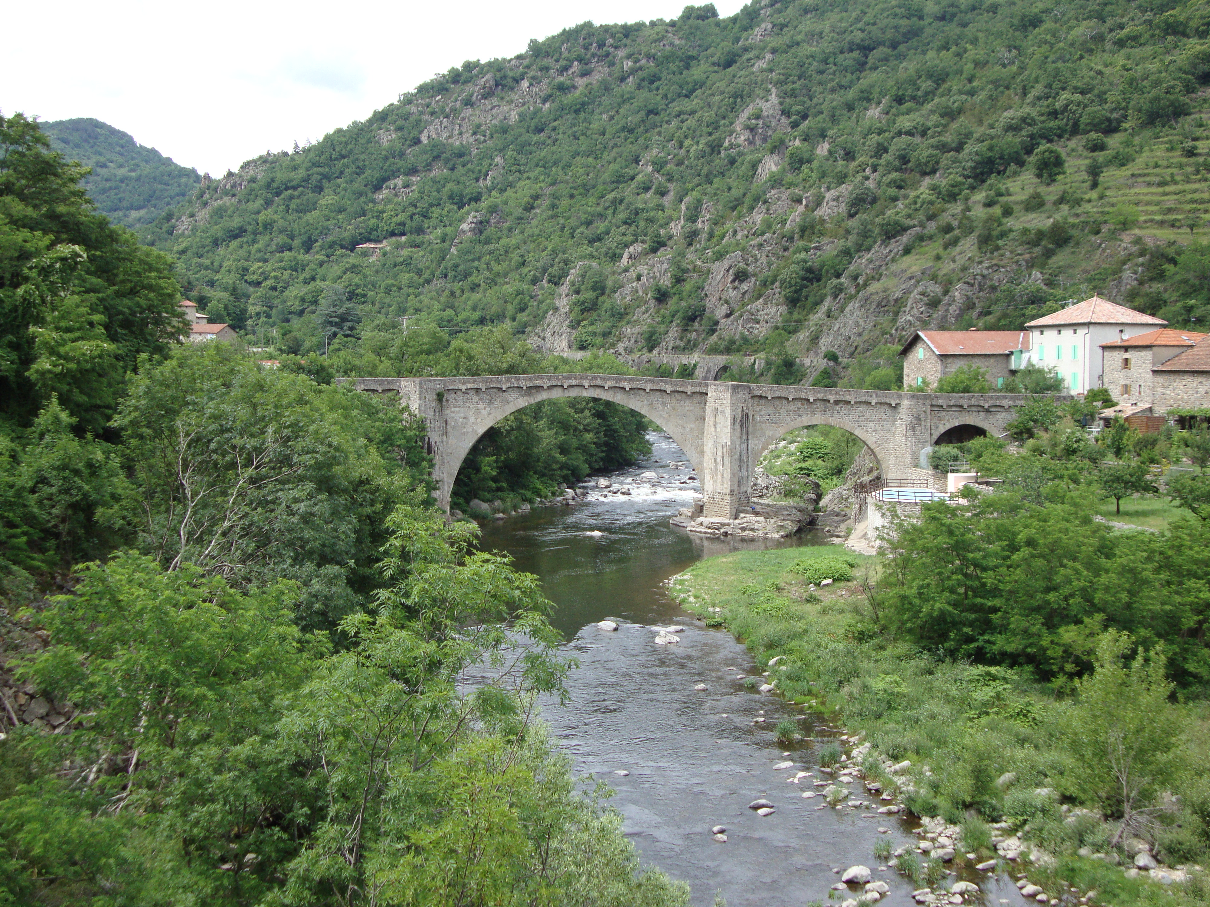 Chalencon_(Ardèche,_Fr)_l'Eyrieux,_Pont_de_Chervil.